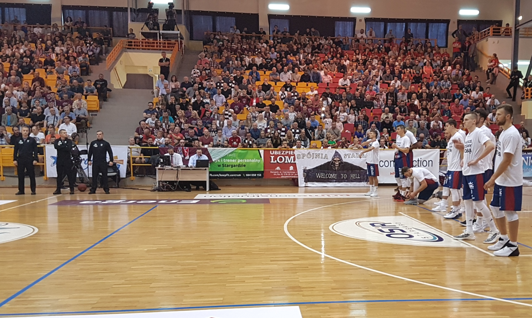 King Szczecin (06.10.2018)